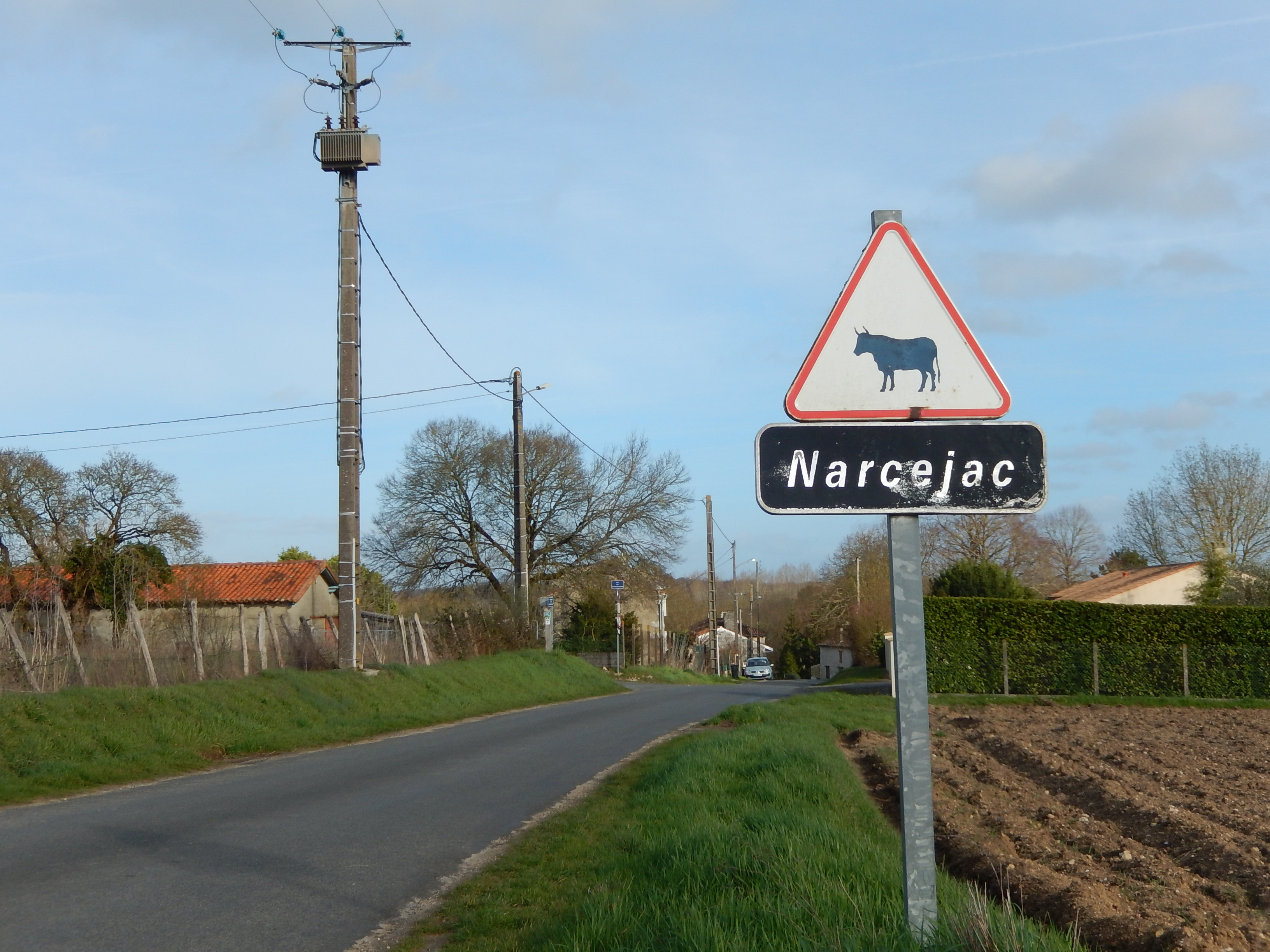 L'entrée du hameau de Narcejac en début mars 2019.